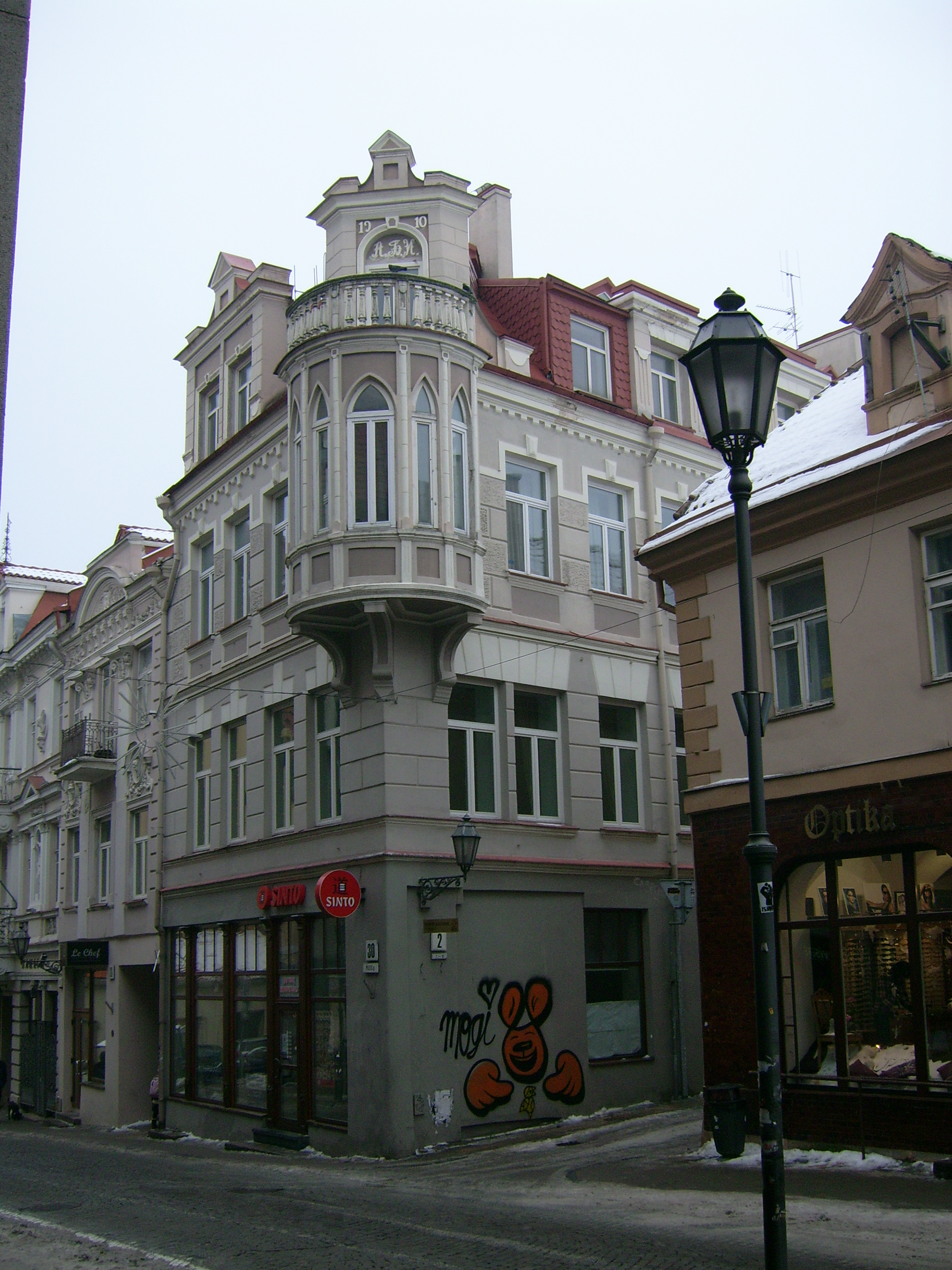 Pastatas, kuriame Chirurgų-barzdaskučių cechas XVII a. nuomojosi patalpas.